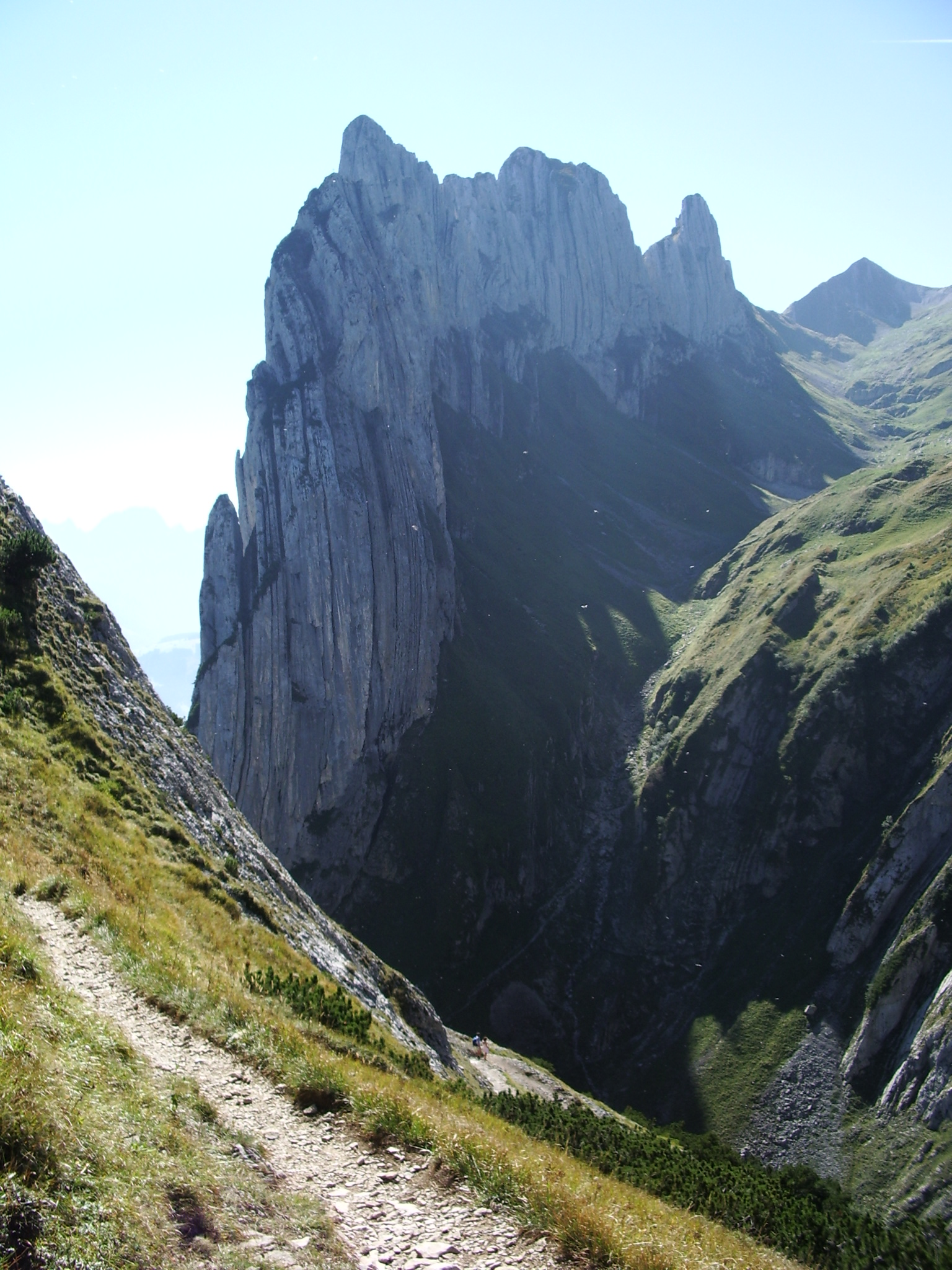 Kreuzberge bei der Saxer Lücke. Bild selbst gemacht im September 2006.